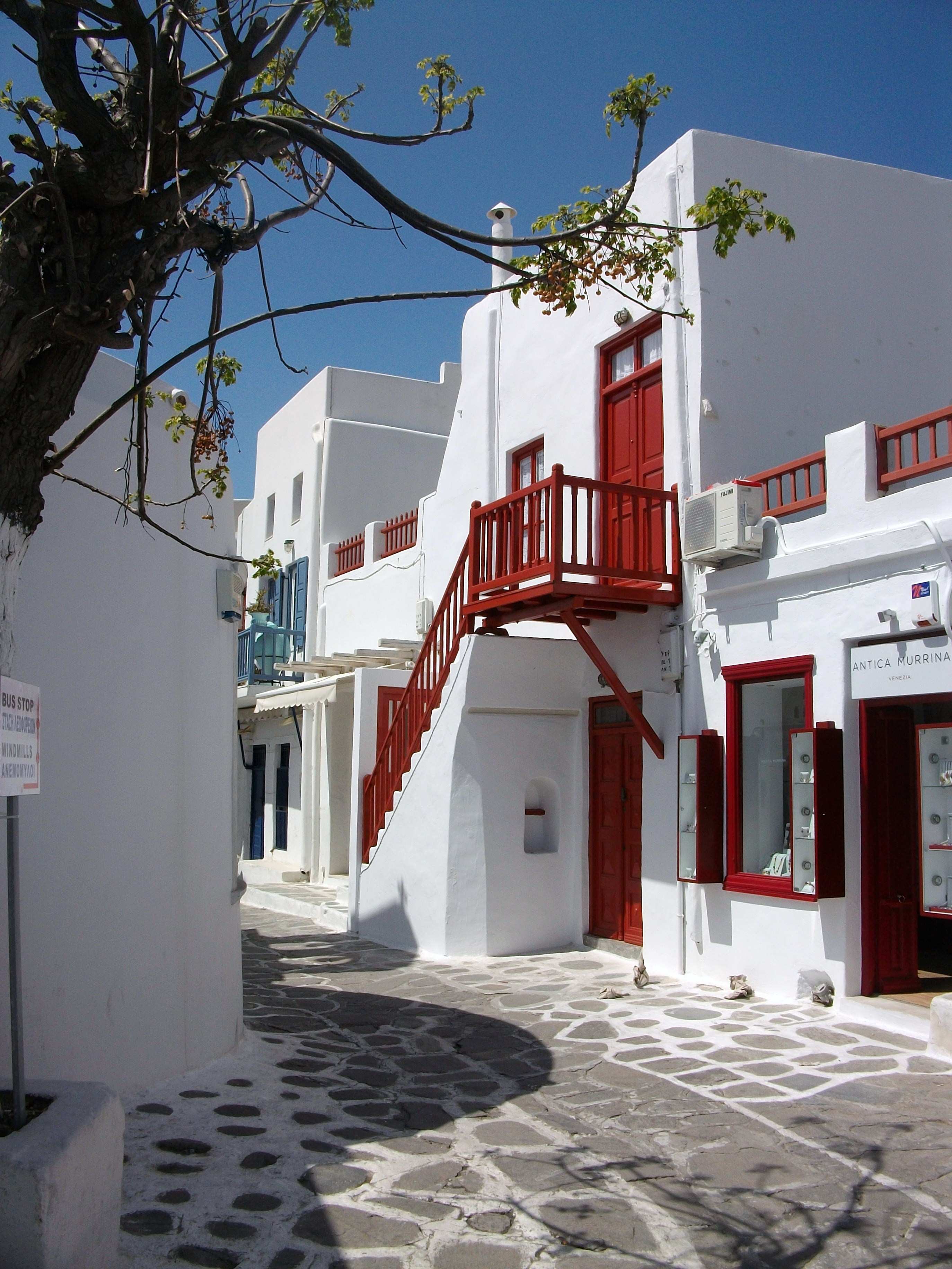 Carrer de Míkonos, illes Cíclades.